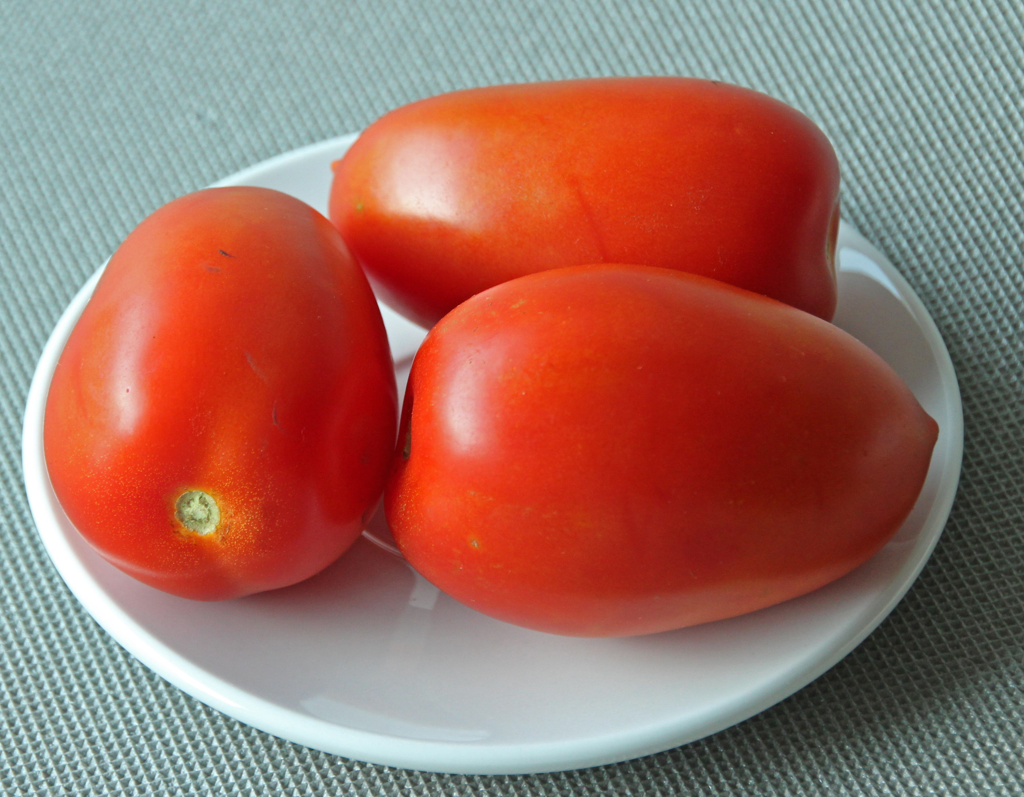 Bildinhalt: Drei Früchte der Tomatensorte Roma auf einem weißen Teller Aufnahmeort: Frankfurt am Main, Deutschland